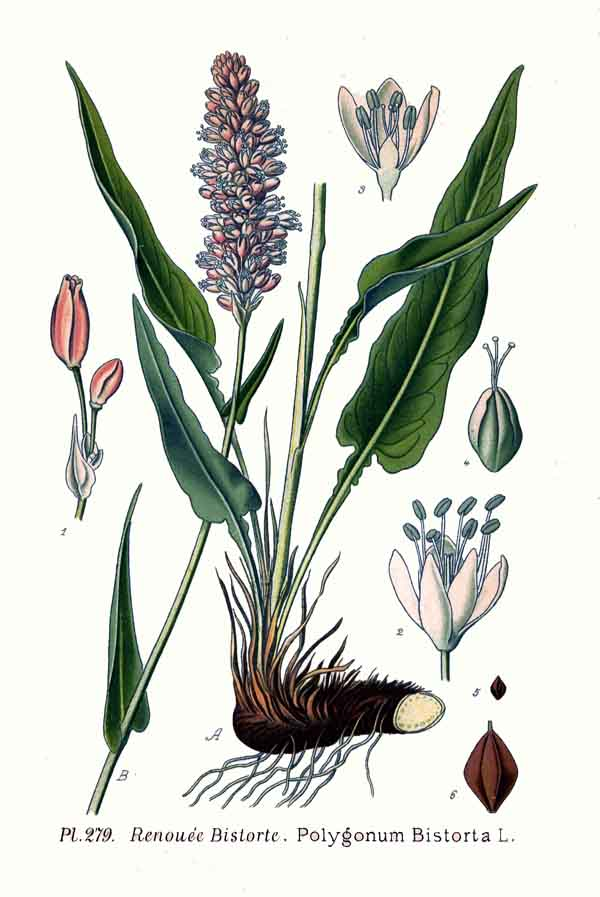 Polygonum bistorta L.